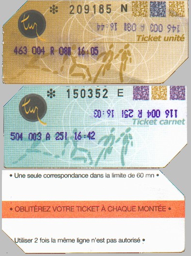 Sample tickets used on TUR Rheims bus network Tickets unité et carnet du réseau des Transports urbains de Reims